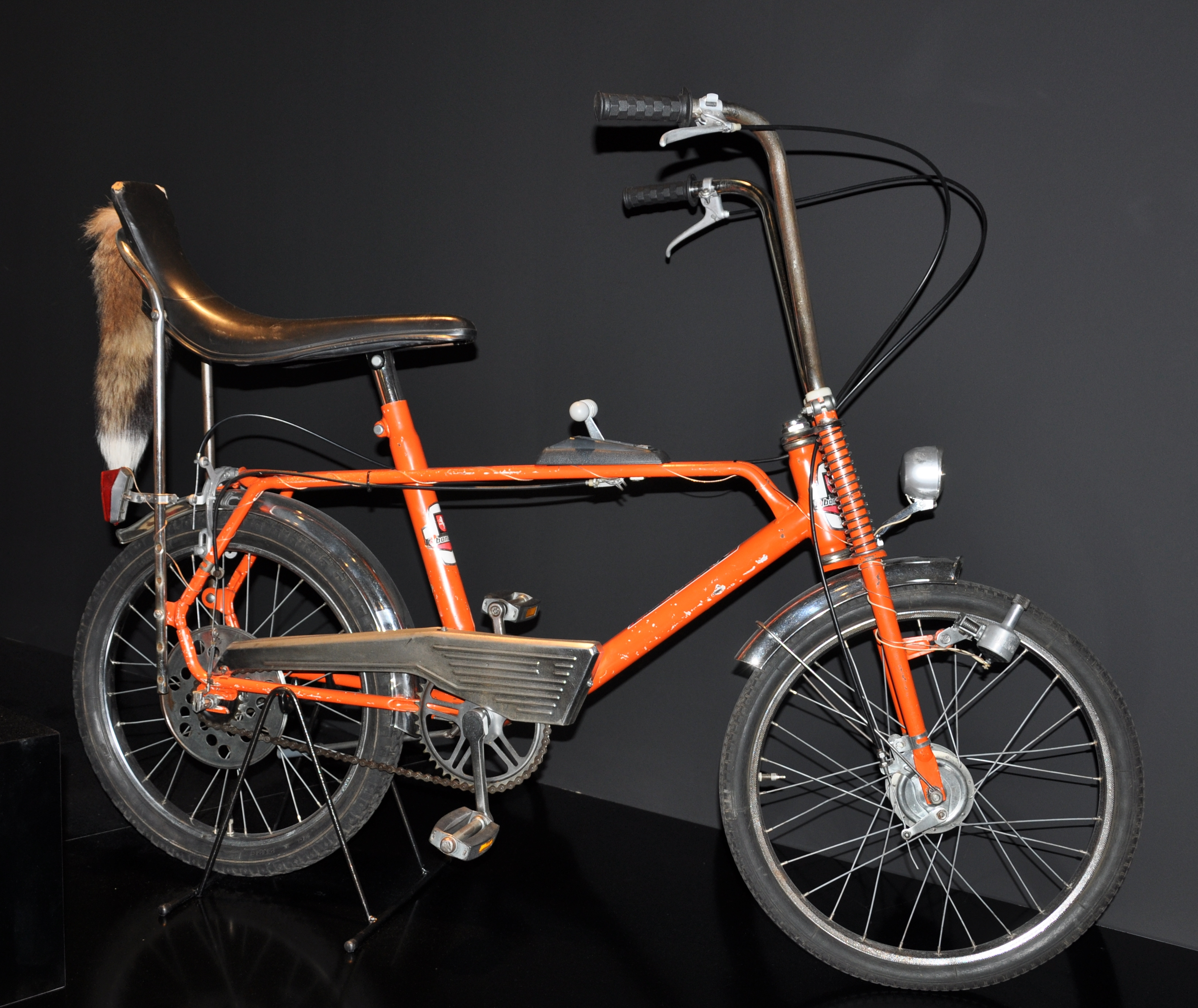 Bonanzarad, Otto Kynast GmbH&Co. KG, Quakenbrück 1970, 18,0 kg - im Besitz des Technoseums